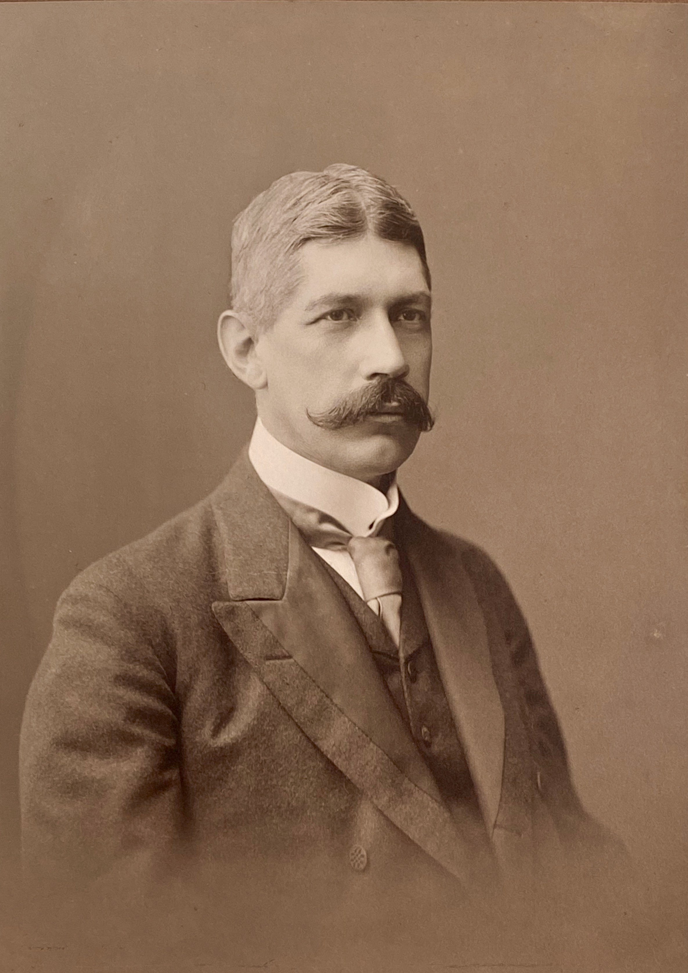 Gustaf Lagerbjelke (1860-1937)